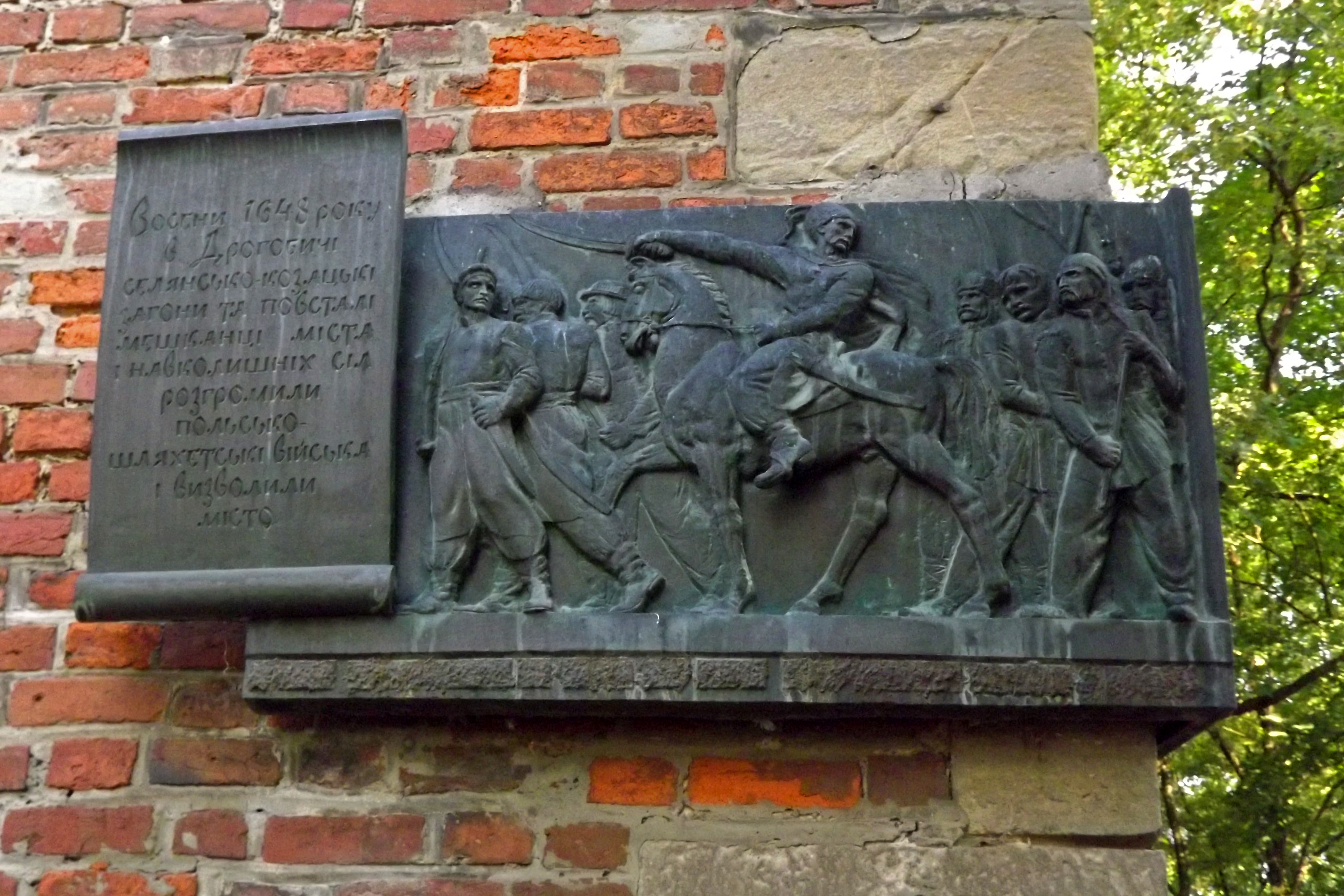 Художньо-меморіальна таблиця на честь визволення міста козацько-селянськими загонами від польсько-шляхетських військ (Дрогобич, Львівська область)